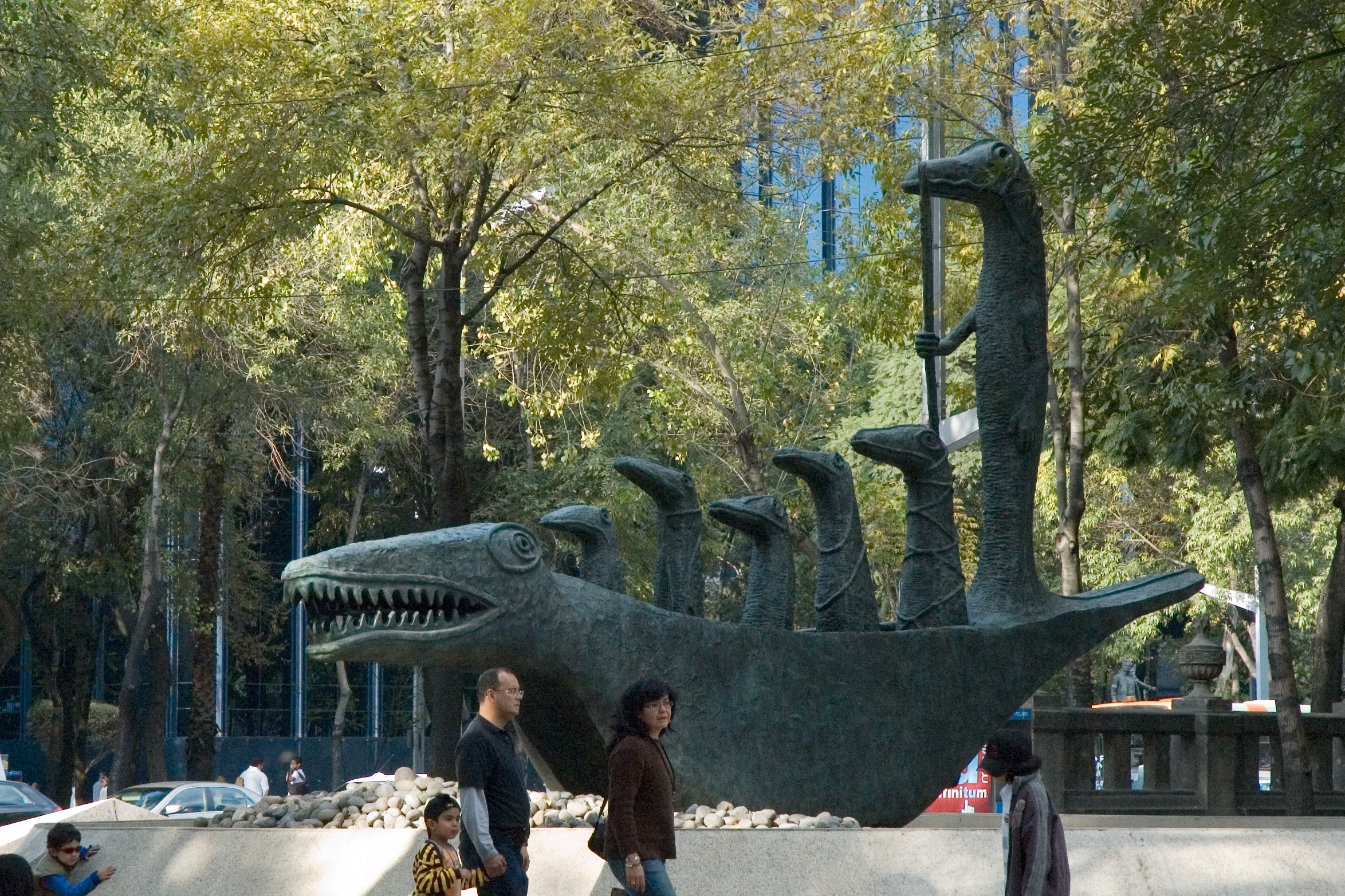 Cocodrilo by Leonora Carrington on Paseo de la Reforma